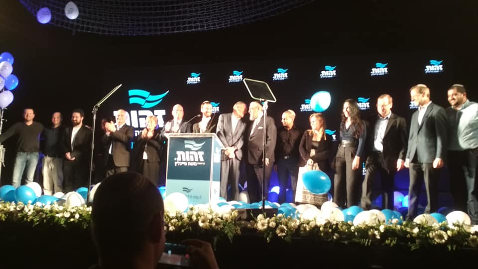 כינוס מפלגת זהות